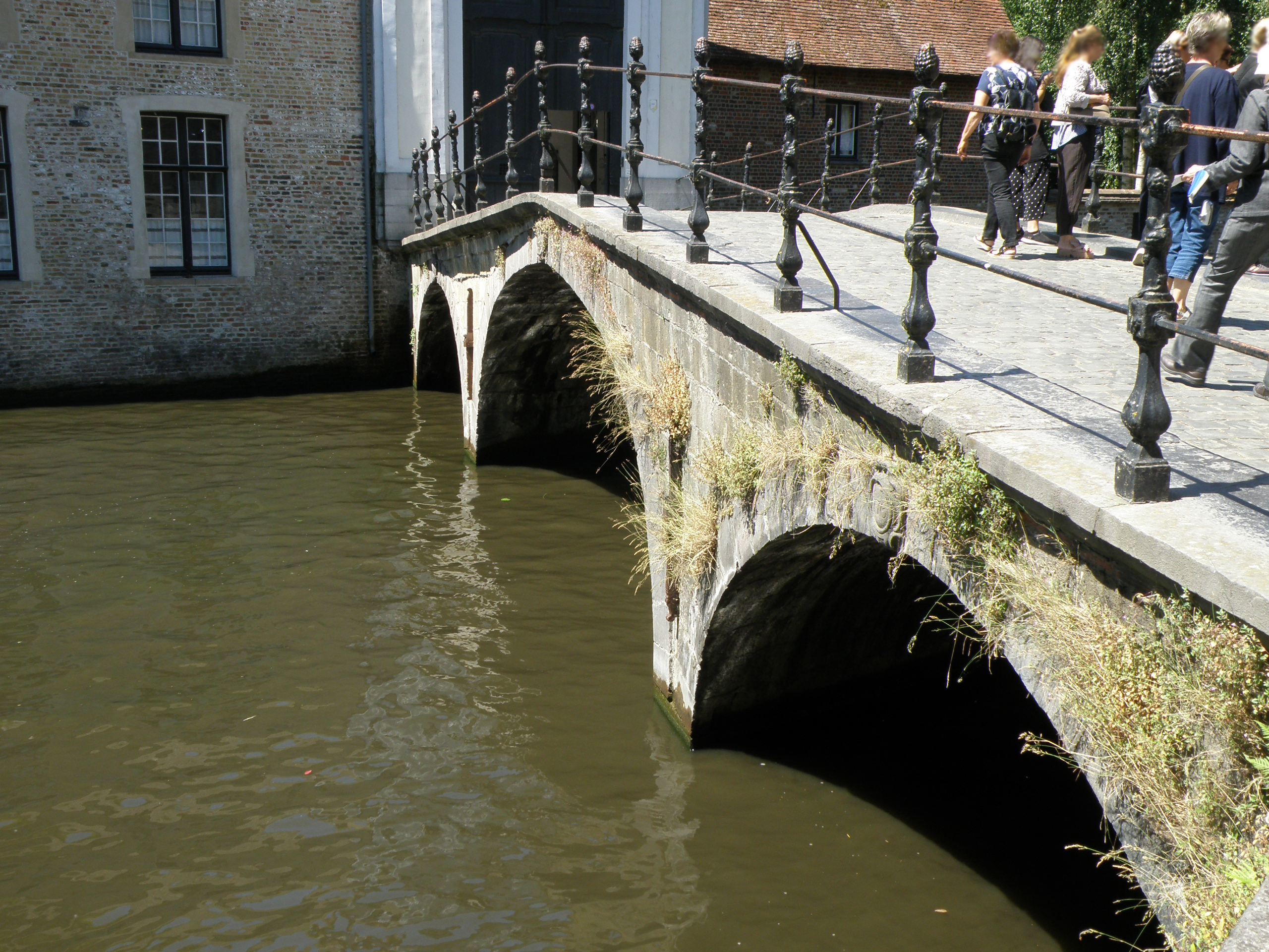 Brugge, Begijnhofbrug of Wijngaardbrug.